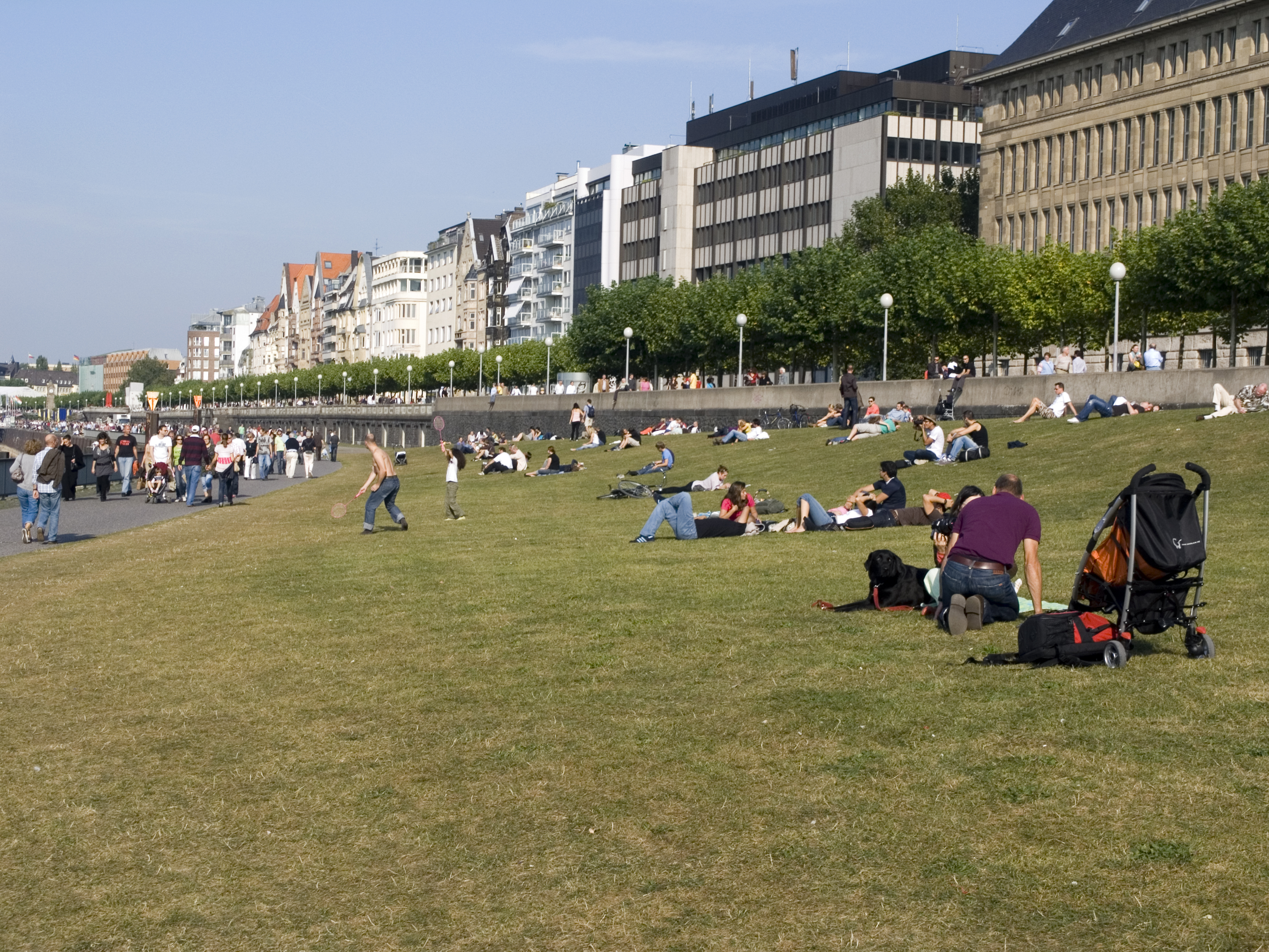 Северный Рейн - Вестфалия, Дюссельдорф - набережная Маннесманн